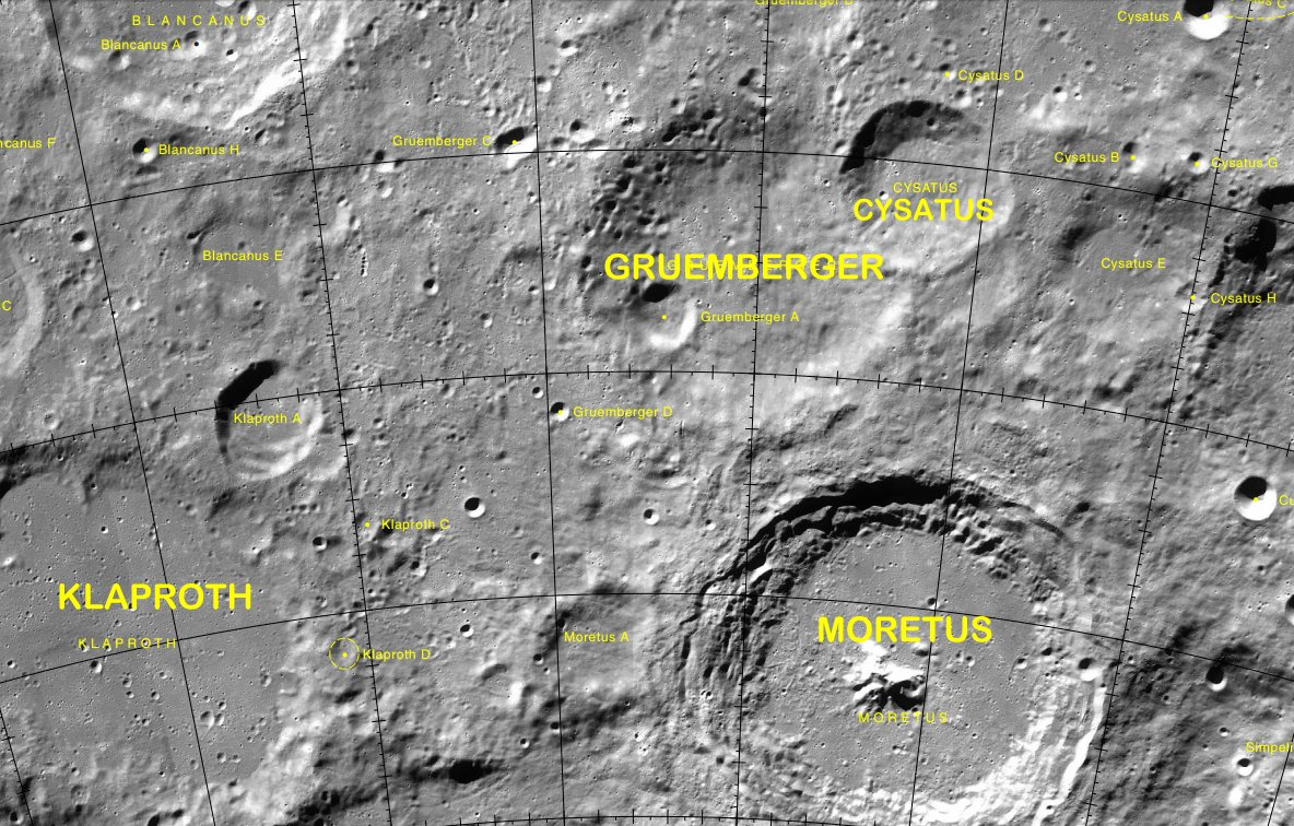 Cráter lunar Cysatus (LRO)